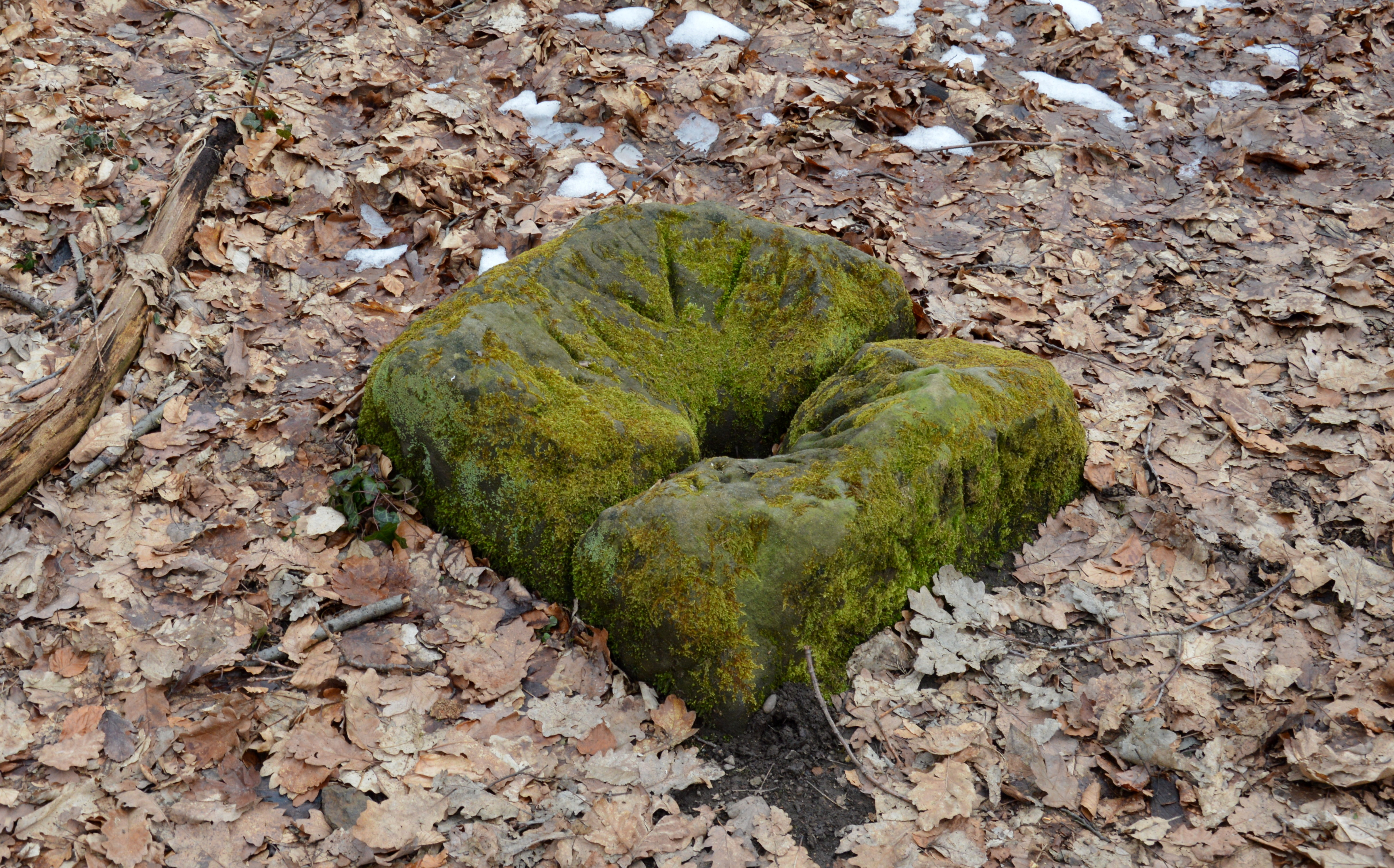 Salzlecke Öhlbergshöhe